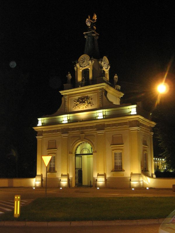 Brama główna (wieża Gryfa) Pałacu Branickich w Białymstoku nocą